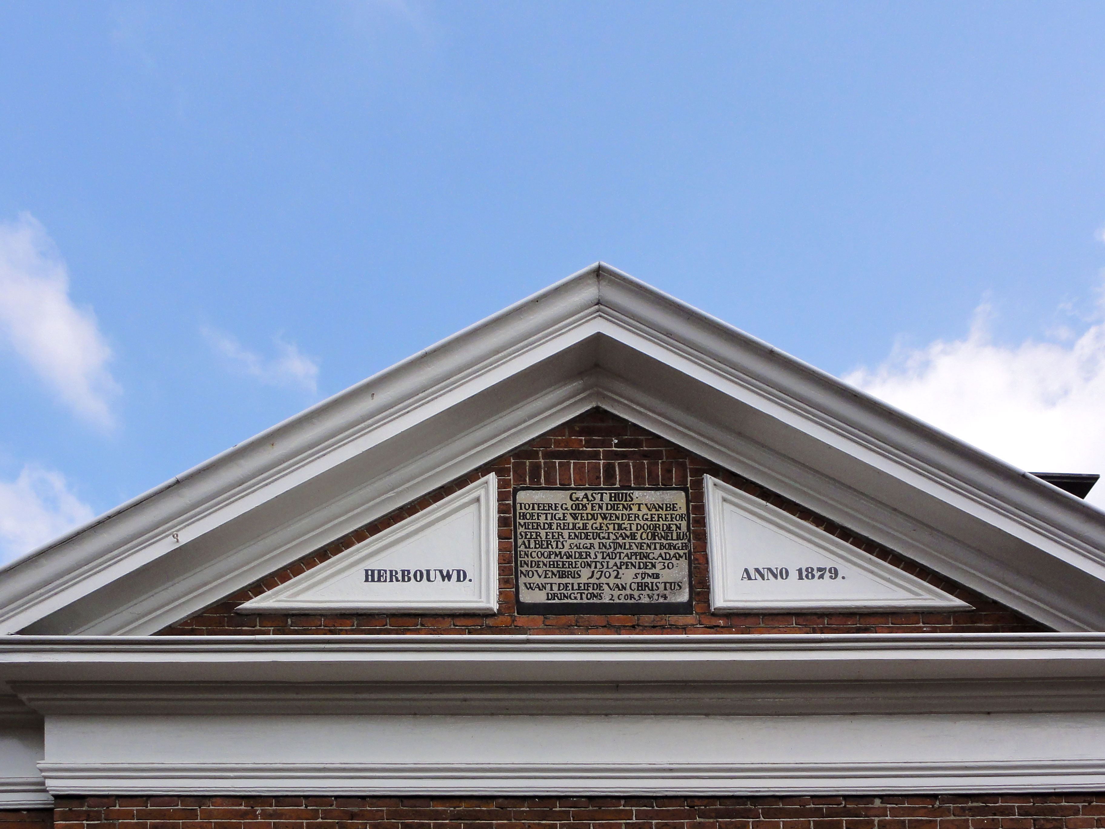 Cornelis Albert Gasthuis in de Cornelis Albertsstraat 1 te Appingedam